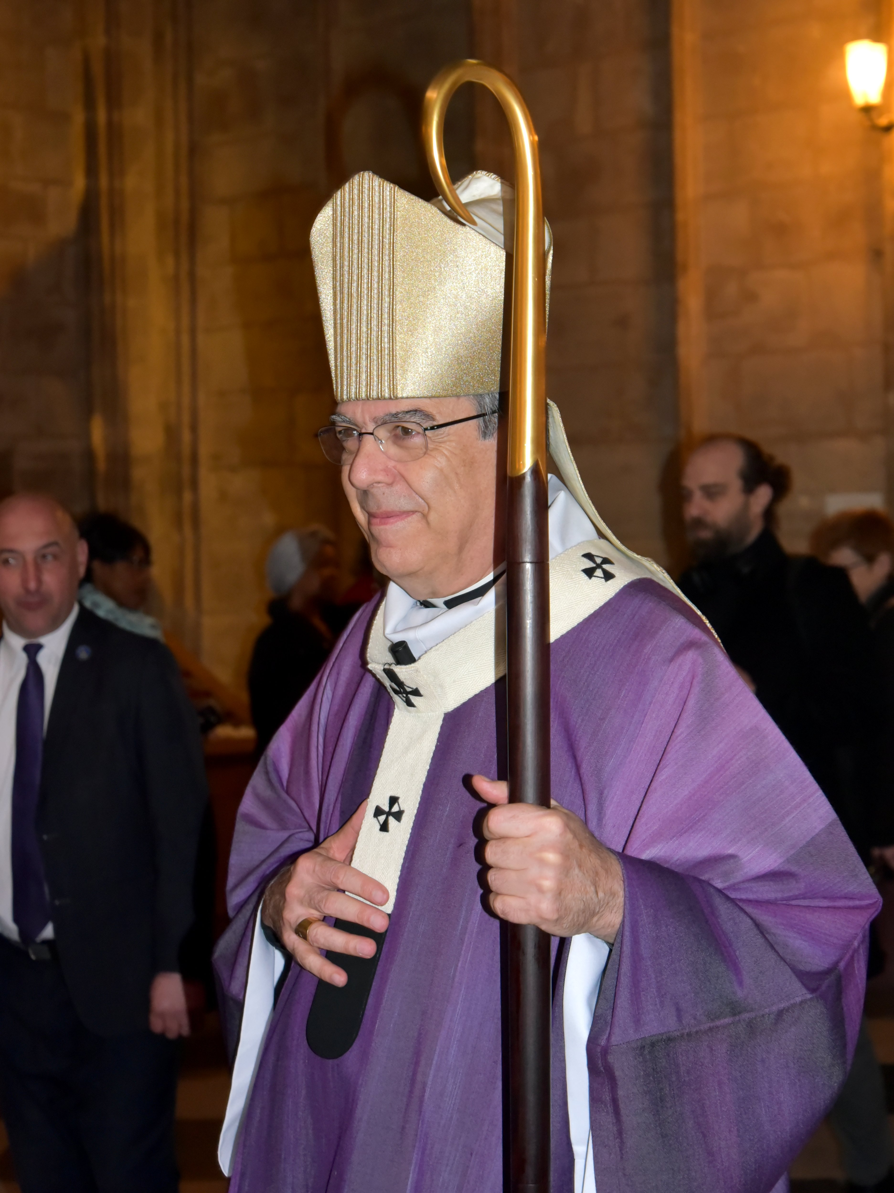 Mgr Michel Aupetit lors de la 11ème Nuit des Témoins d'Aide à l'Église en Détresse à Paris.